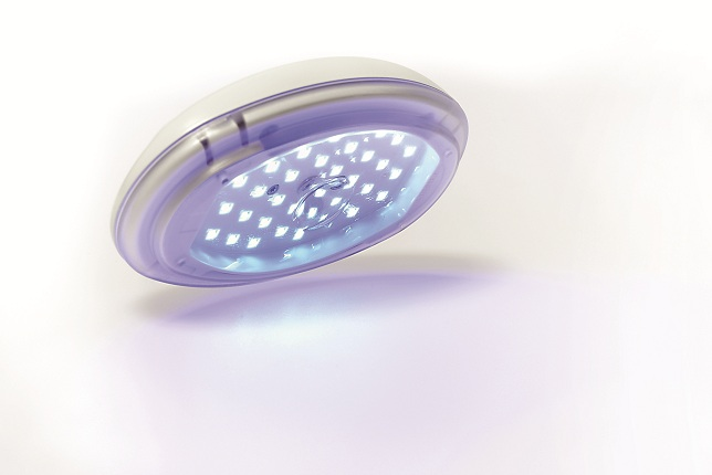 Dermatologiske lysbehandling for psoriasis